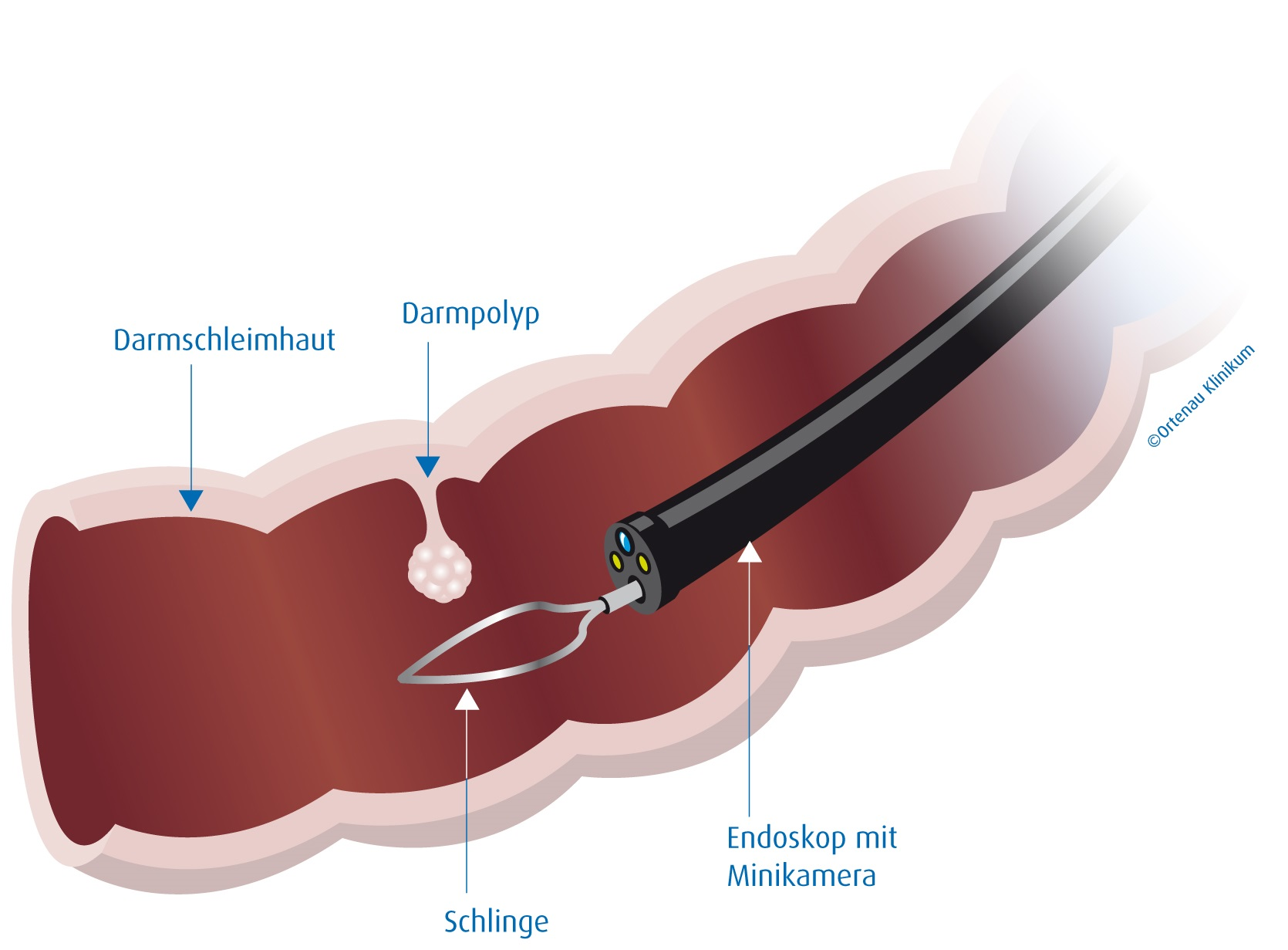 Schaubild Darmspiegelung